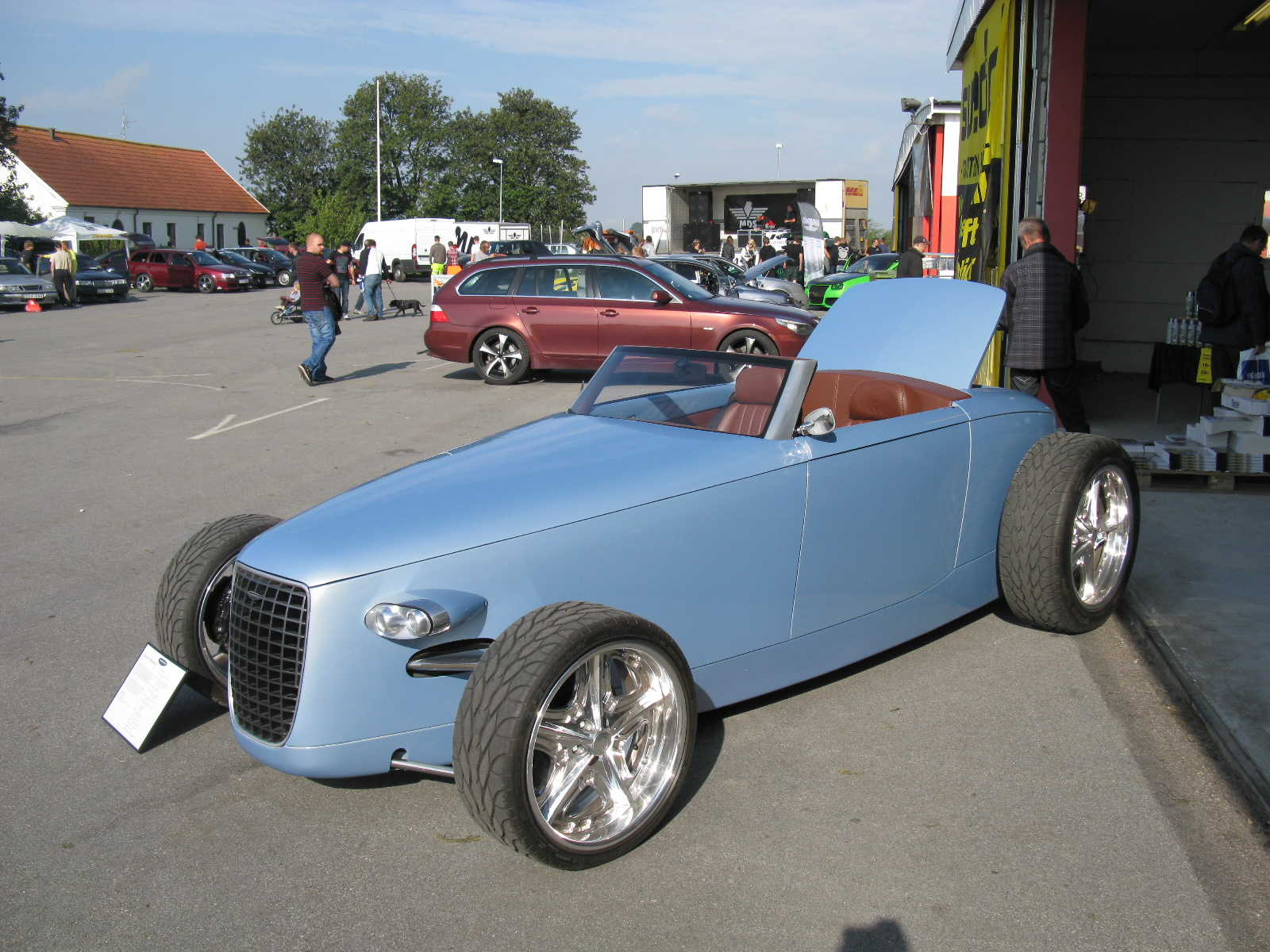 Volvo Hot Rod